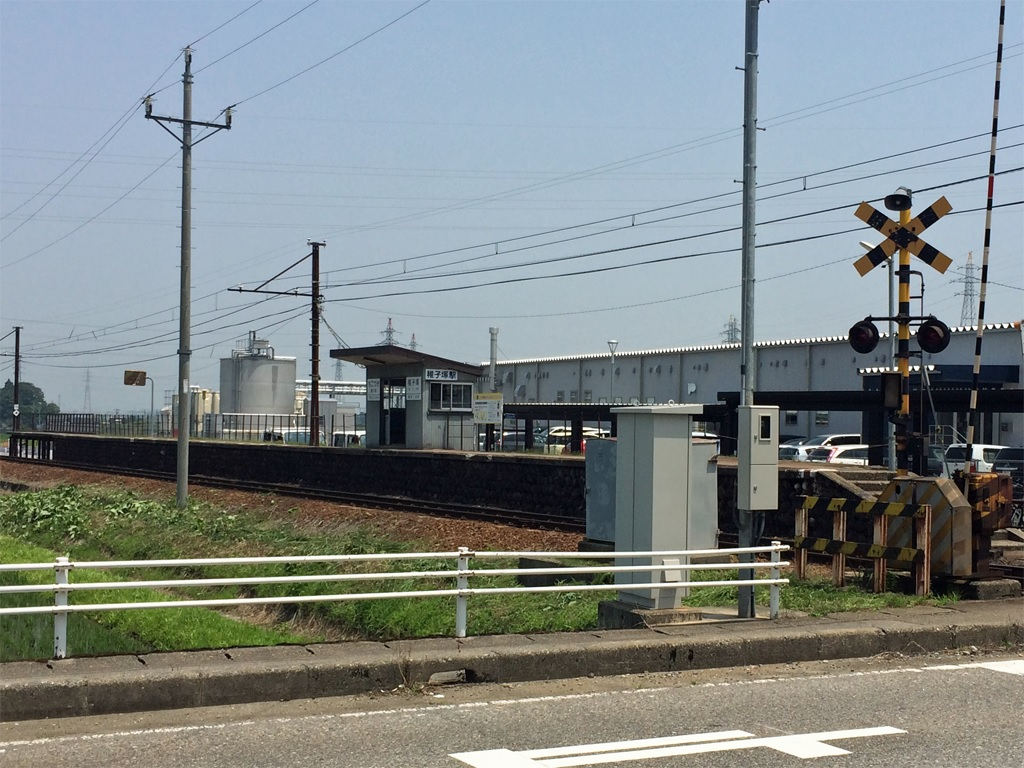 富山地方鉄道 稚子塚駅全景